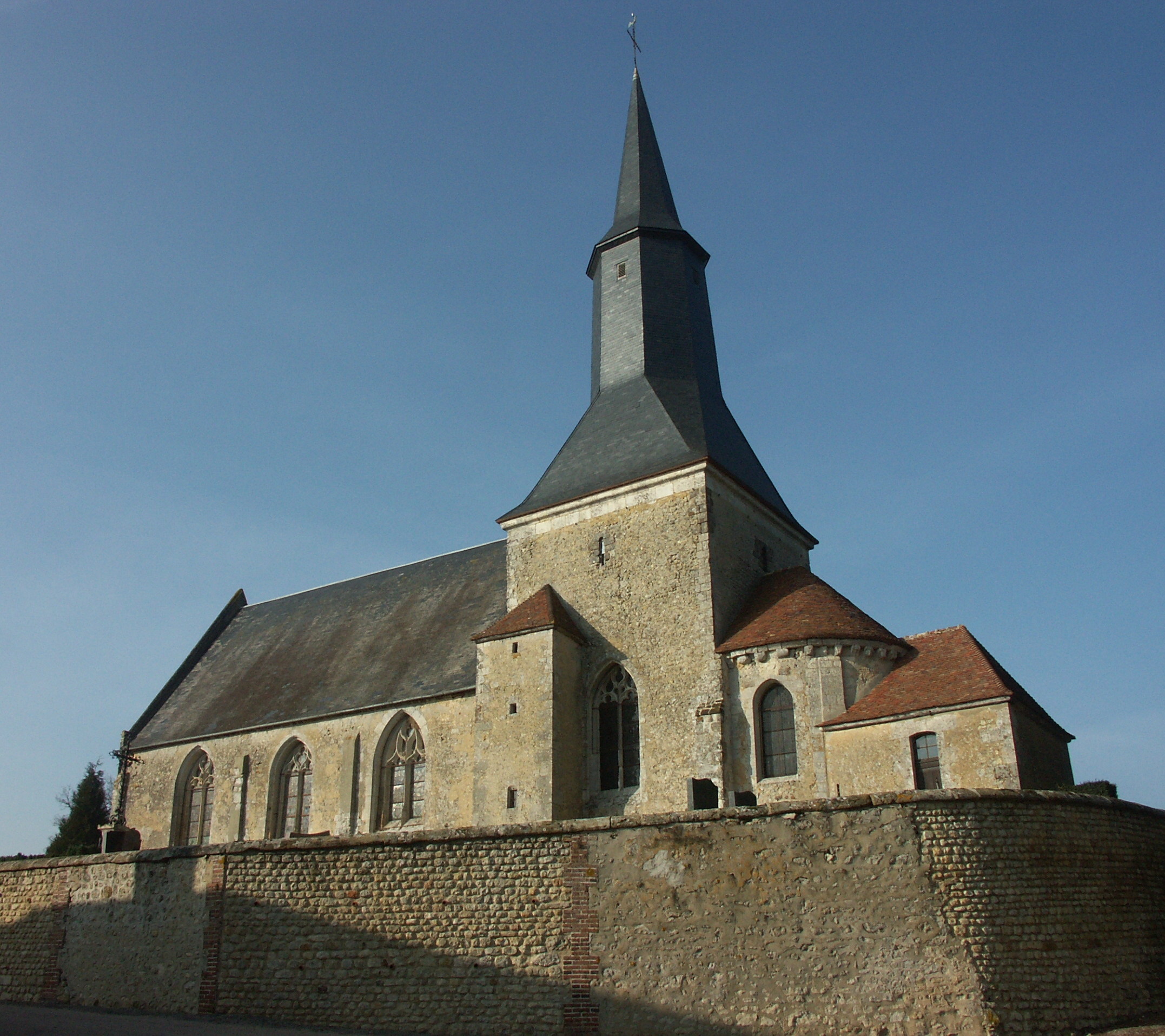 Selon la légende de saint Evroult la construction fut décidée en 994 . Edifice d’époque romane (abside, porche) remanié par la suite (notamment percement des baies au 16e). Clocher-tour carré. Sacristie adossée au chevet. CMH 1965. ext, nef, tour, escalier hors-œuvre, abside et sacristie vues du sud est